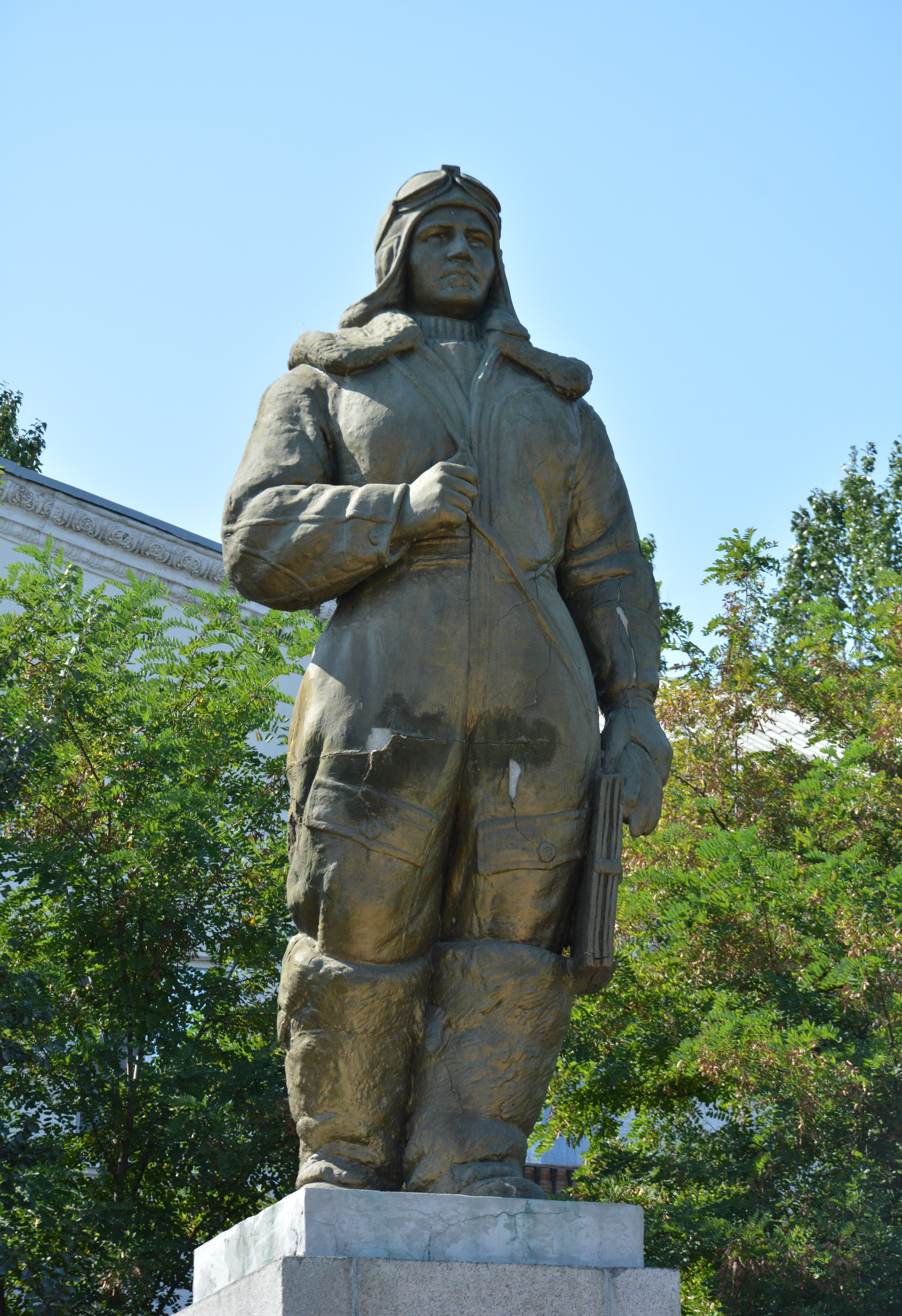 Пам`ятник Осипенко П.Д. - Герою Радянського Союзу, Бердянськ, Привокзальна площа